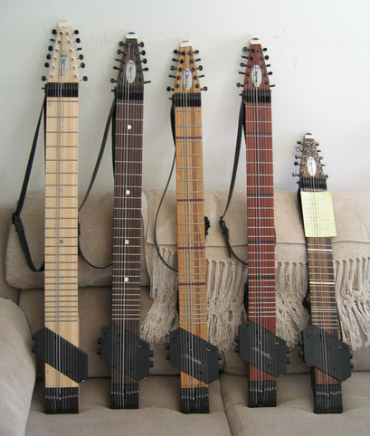 Chapman Sticks awaiting shipment at Stick Enterprises. Photo by Matt Perry. Free to use with attribution. Scaricato da